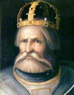 Friedrich Barbarossa